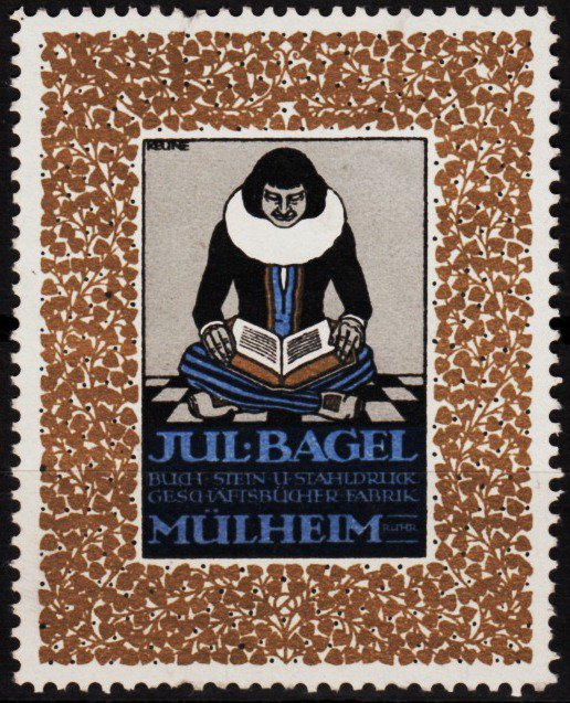 Reklamemarke mit der Künstlersignatur von Heinz Keune über einem im Schneidersitz in einem Buch lesenden Menschen, darunter der Text „Jul. Bagel Buch- Stein- u. Stahldruck Geschäftsbücher-Fabrik Mülheim Ruhr“ Das zentrale Bild wird umrahmt von kleinteiligem Rankenwerk